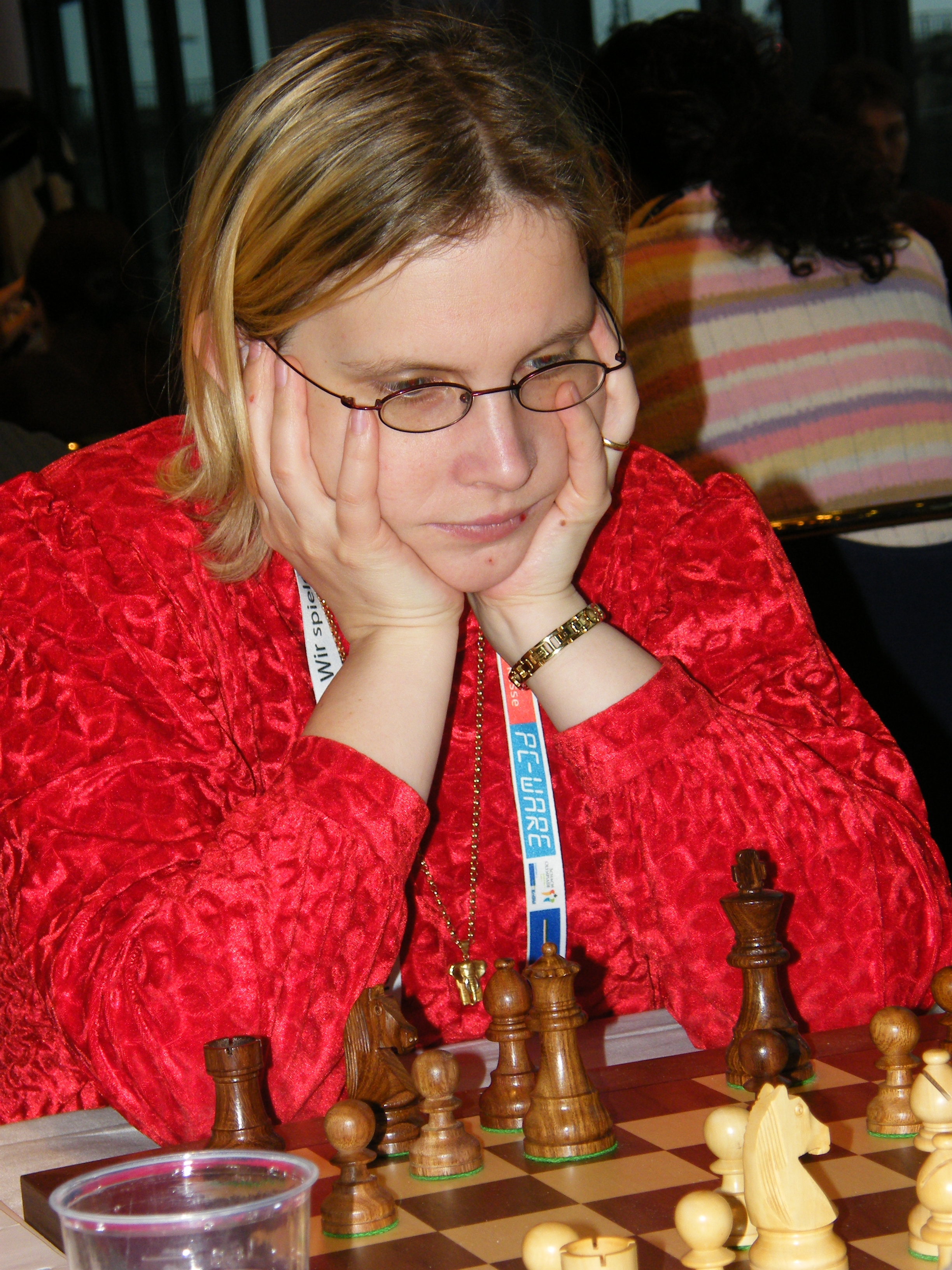 Lenka Ptacnikova bei der 38. Schacholympiade in Dresden 2008